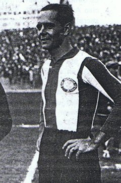 Ricardo Saprissa vistiendo la camisola del RCD Español, equipo en el que militó entre los años 1922 y 1932.